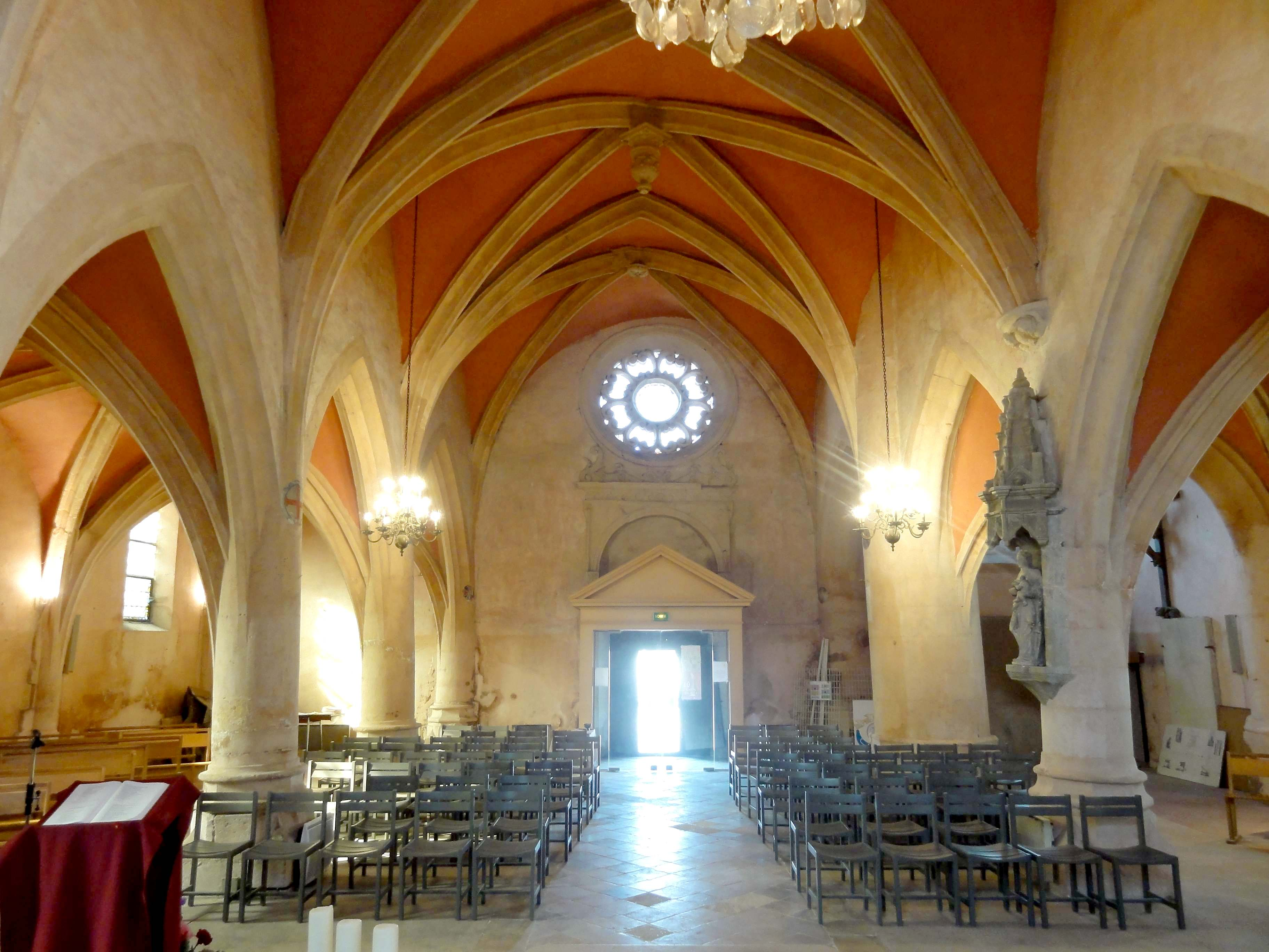 Intérieur de l'église - voir titre.